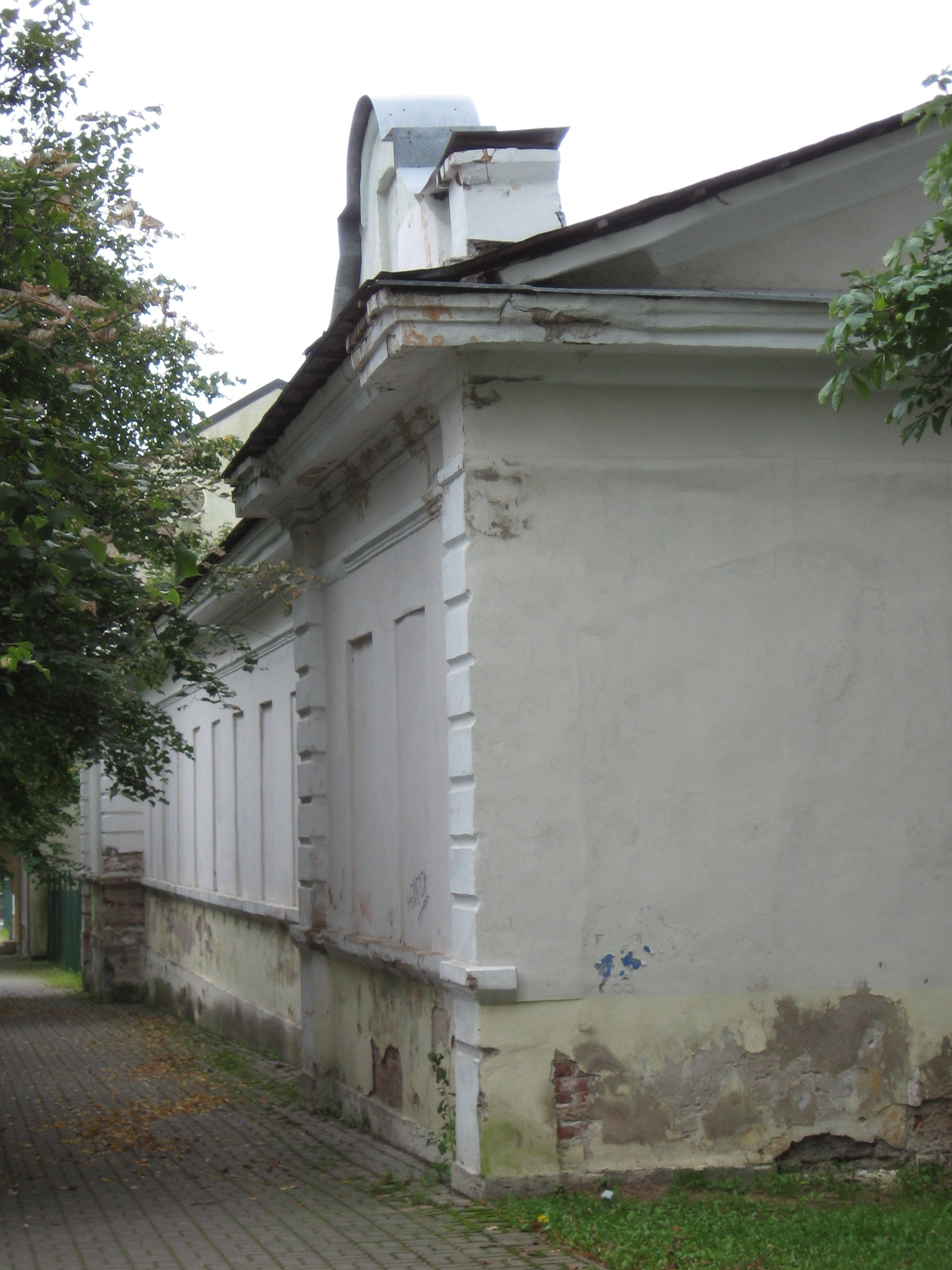 Narva ohvitseride kasiino. Vaade põhjast.